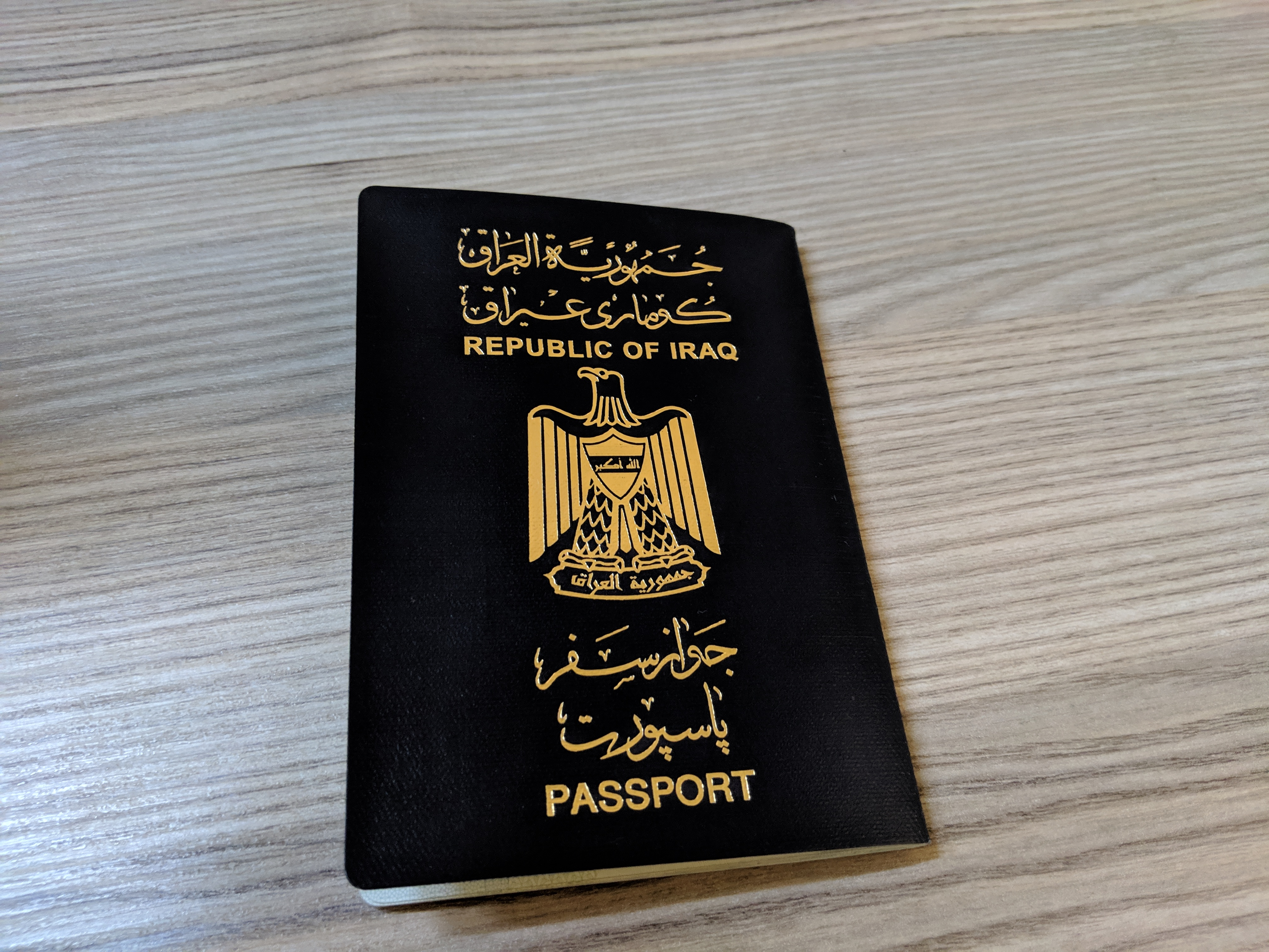 کوردی: وێنەی بەرگی پاسپۆرتی عێراقی